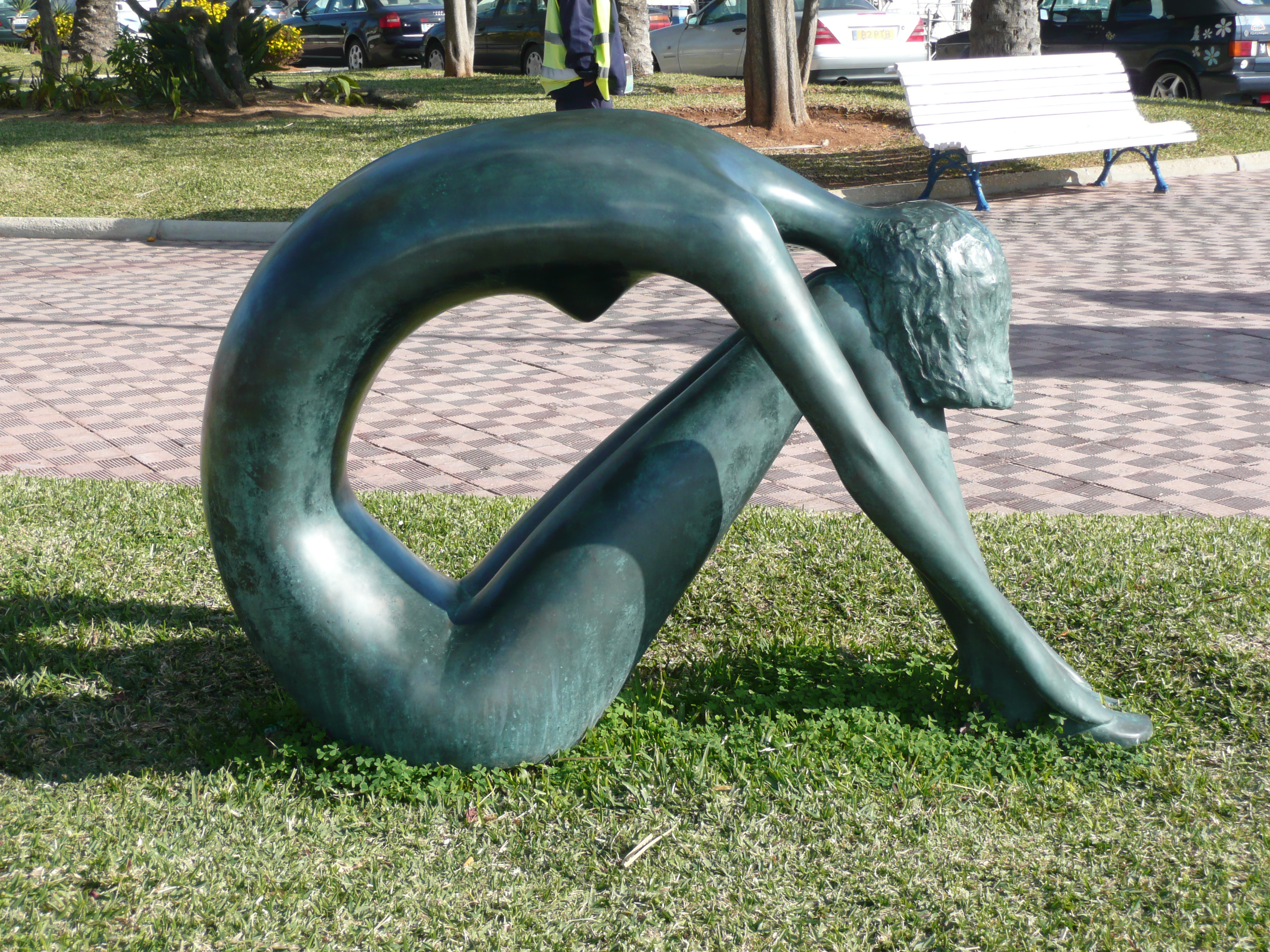 Estatua en bronce en el Puerto de Benalmádena, Málaga, España.